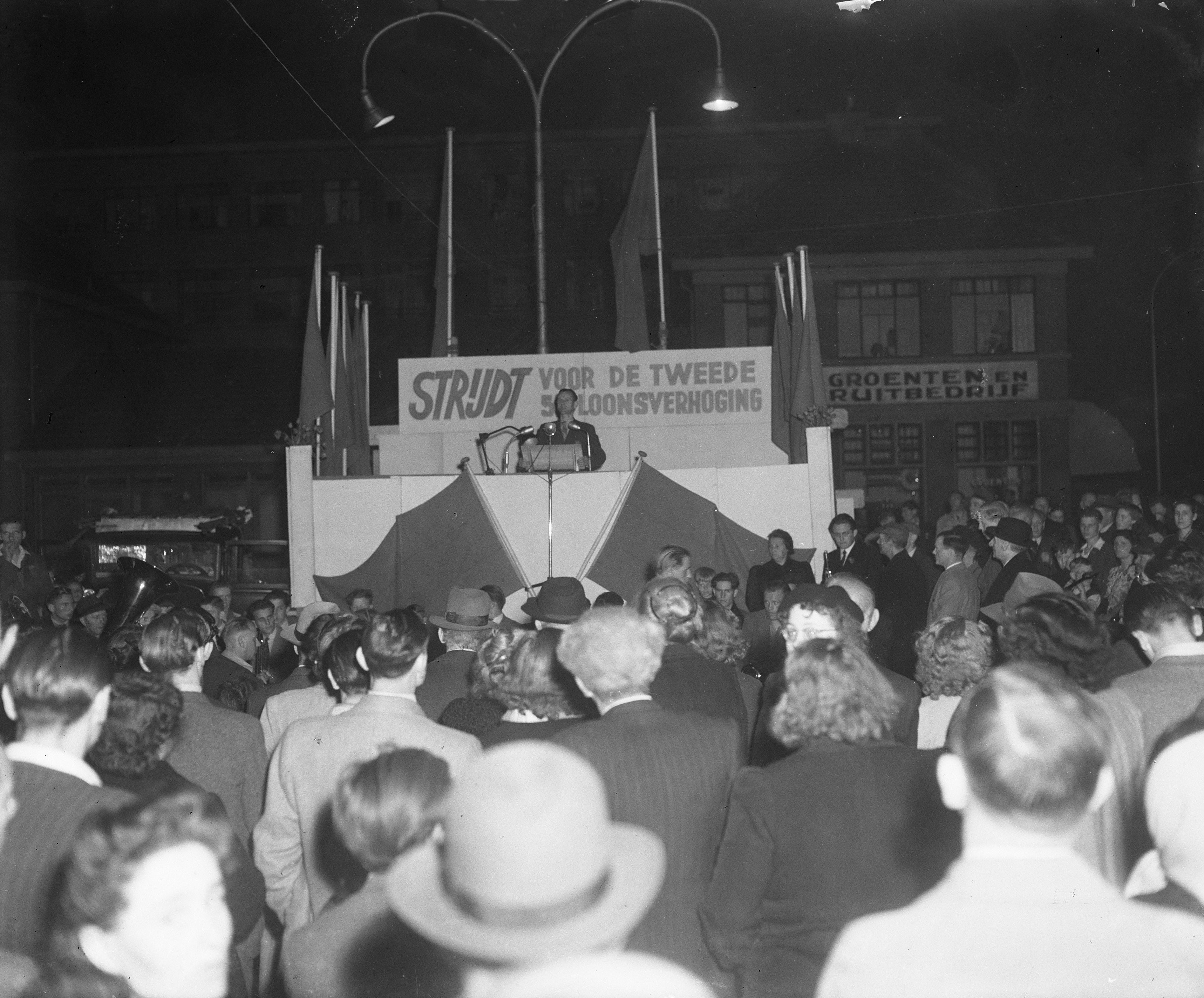 Collectie / Archief : Fotocollectie Anefo Reportage / Serie : [ onbekend ] Beschrijving : 1 Mei Vergadering van de CPN , Den Haag Datum : 3 mei 1950 Locatie : Den Haag, Zuid-Holland Trefwoorden : politieke partijen Instellingsnaam : CPN Fotograaf : Winterbergen, […] / Anefo Auteursrechthebbende : Nationaal Archief Materiaalsoort : Glasnegatief Nummer archiefinventaris : bekijk toegang 2.24.01.09 Bestanddeelnummer : 903-9437